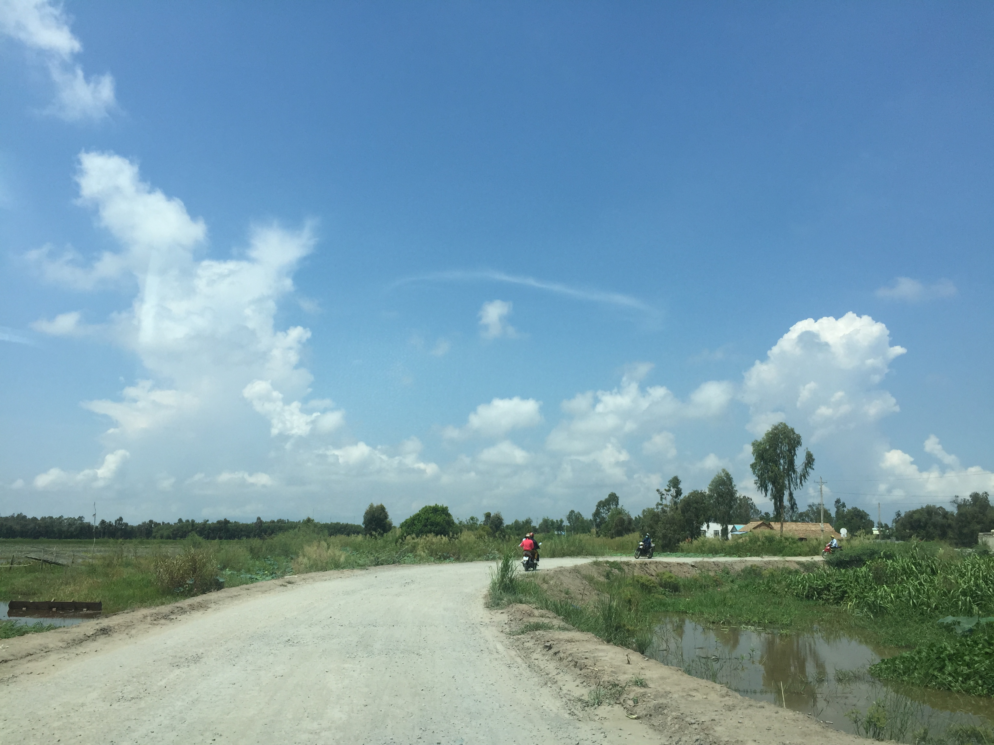 Trường Xuân, Tháp Mười, Đồng Tháp, Vietnam